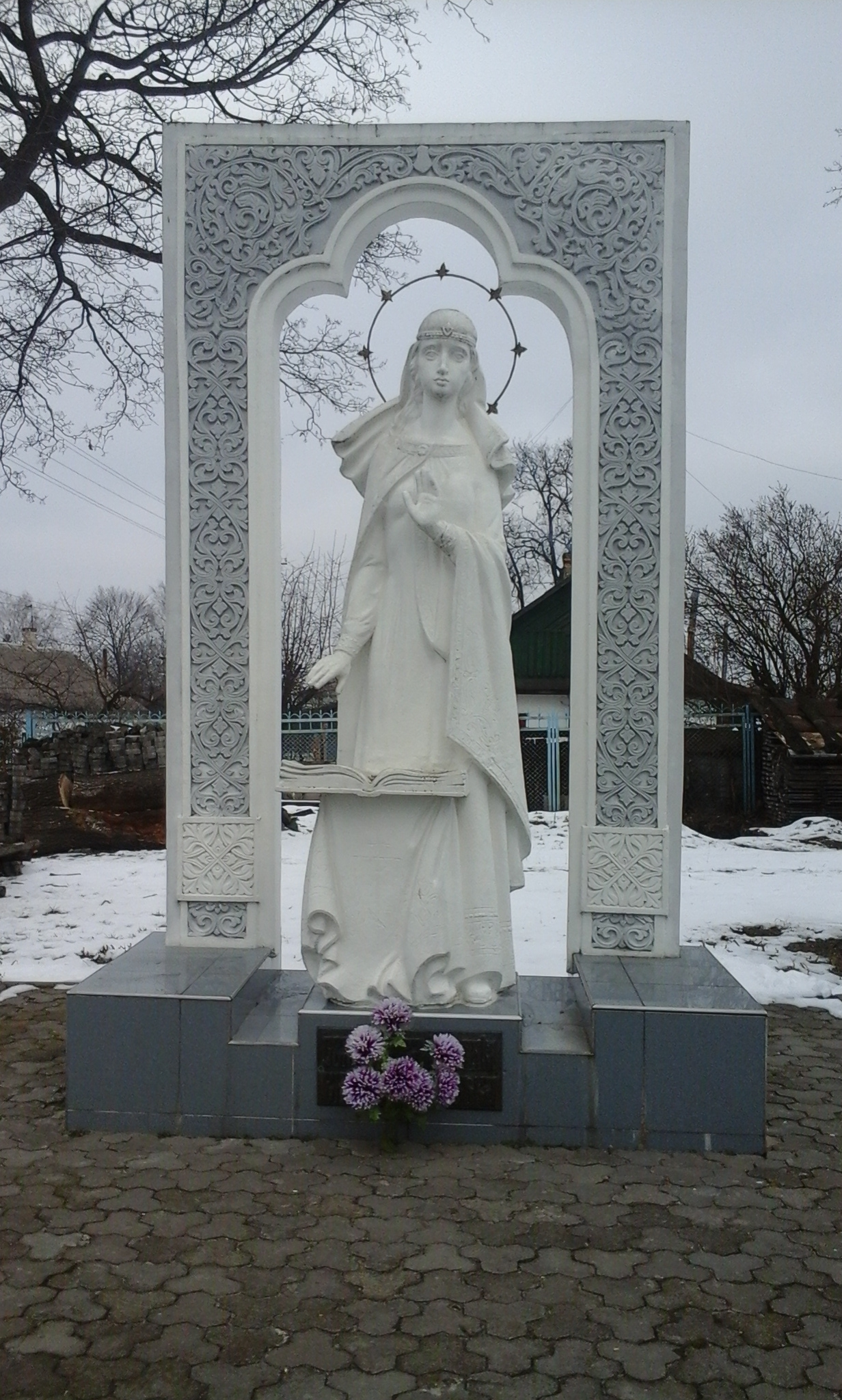 Пам'ятник Юліані Гольшанській у м. Дубровиця, Рівненська область, Україна